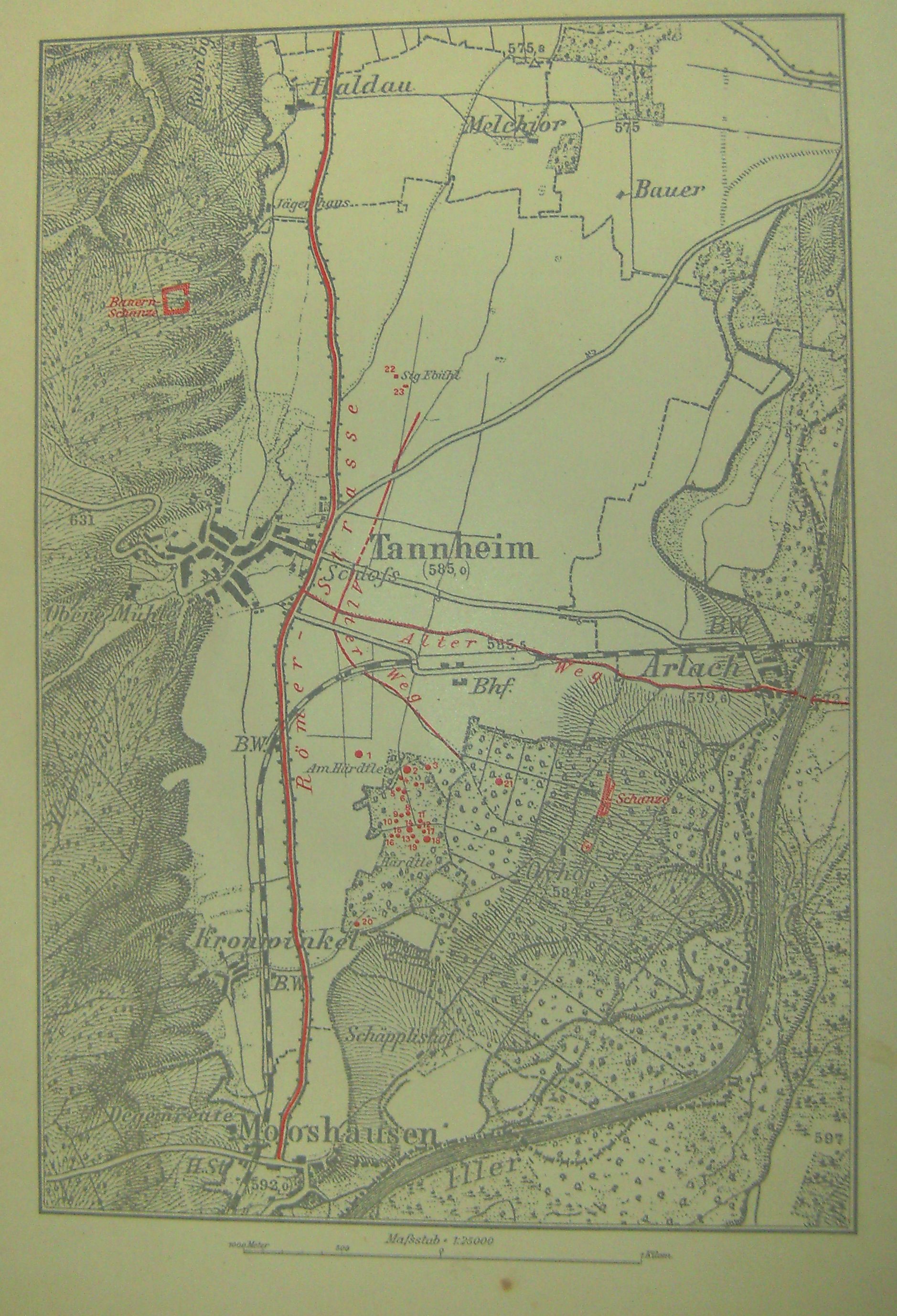 Max Geyr von Schweppenburg, Peter Goessler Hügelgräber im Illertal bei Tannheim, Neff, Esslingen a. N. (1910); Exemplar Stadtarchiv Memmingen